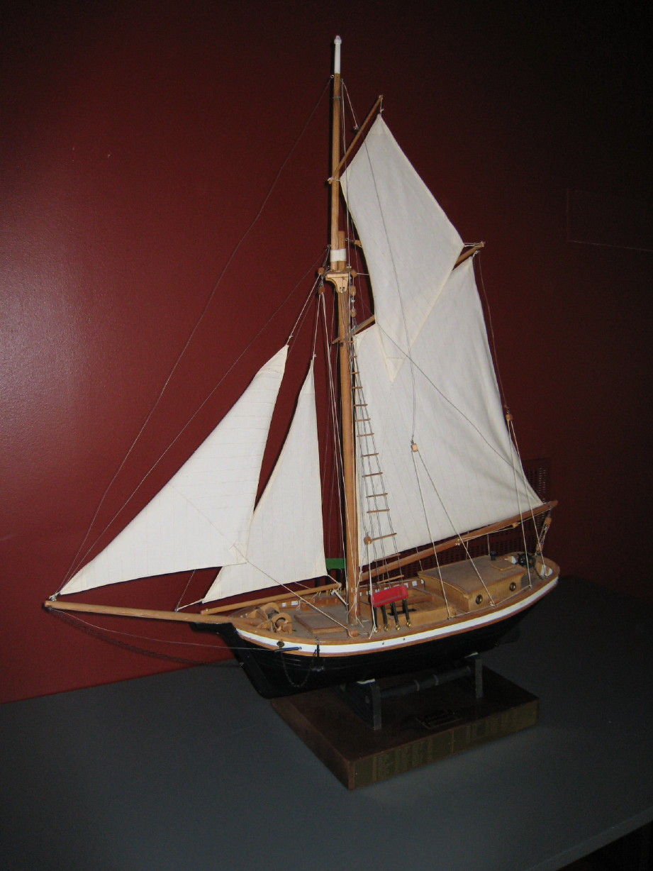 Päijännepurjehdus, Yleiskilpailun kiertopalkinto Tallukka-jahti.